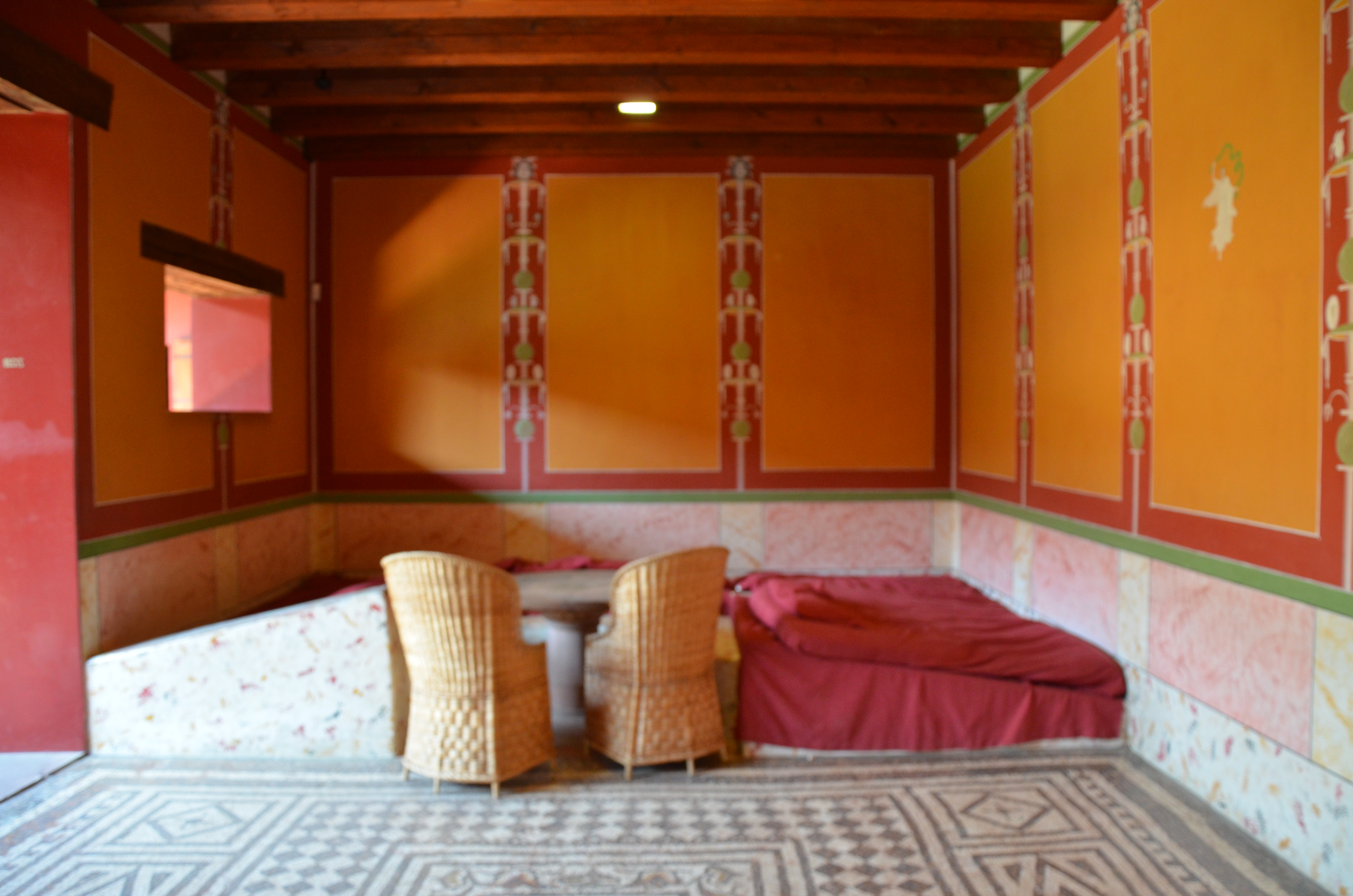 Augusta Raurica, Switzerland